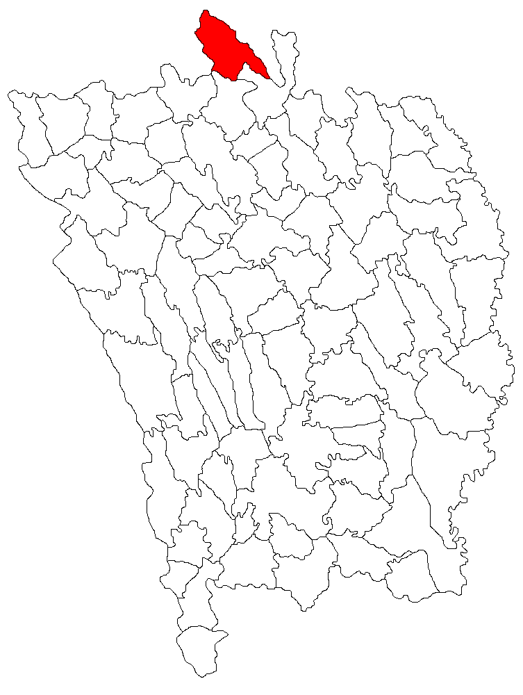 Categorie:Hărţi ale judeţului Vaslui